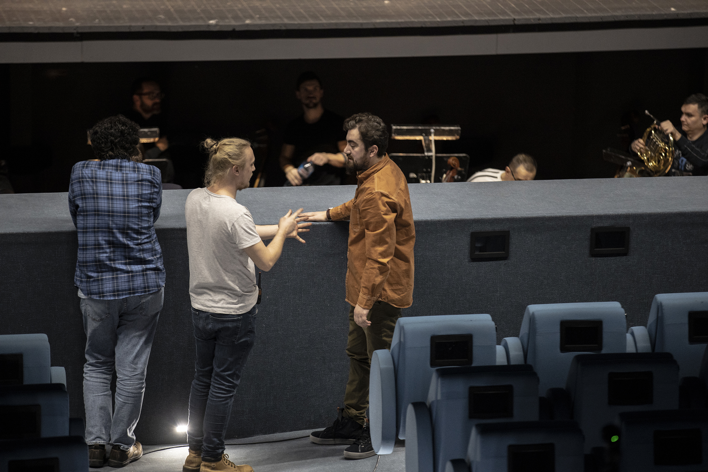 Qëndrim Rijani në prova me operën Skënderbeu në Teatrin Kombëtar të Operës dhe Baletit të Republikës së Maqedonisë së Veriut